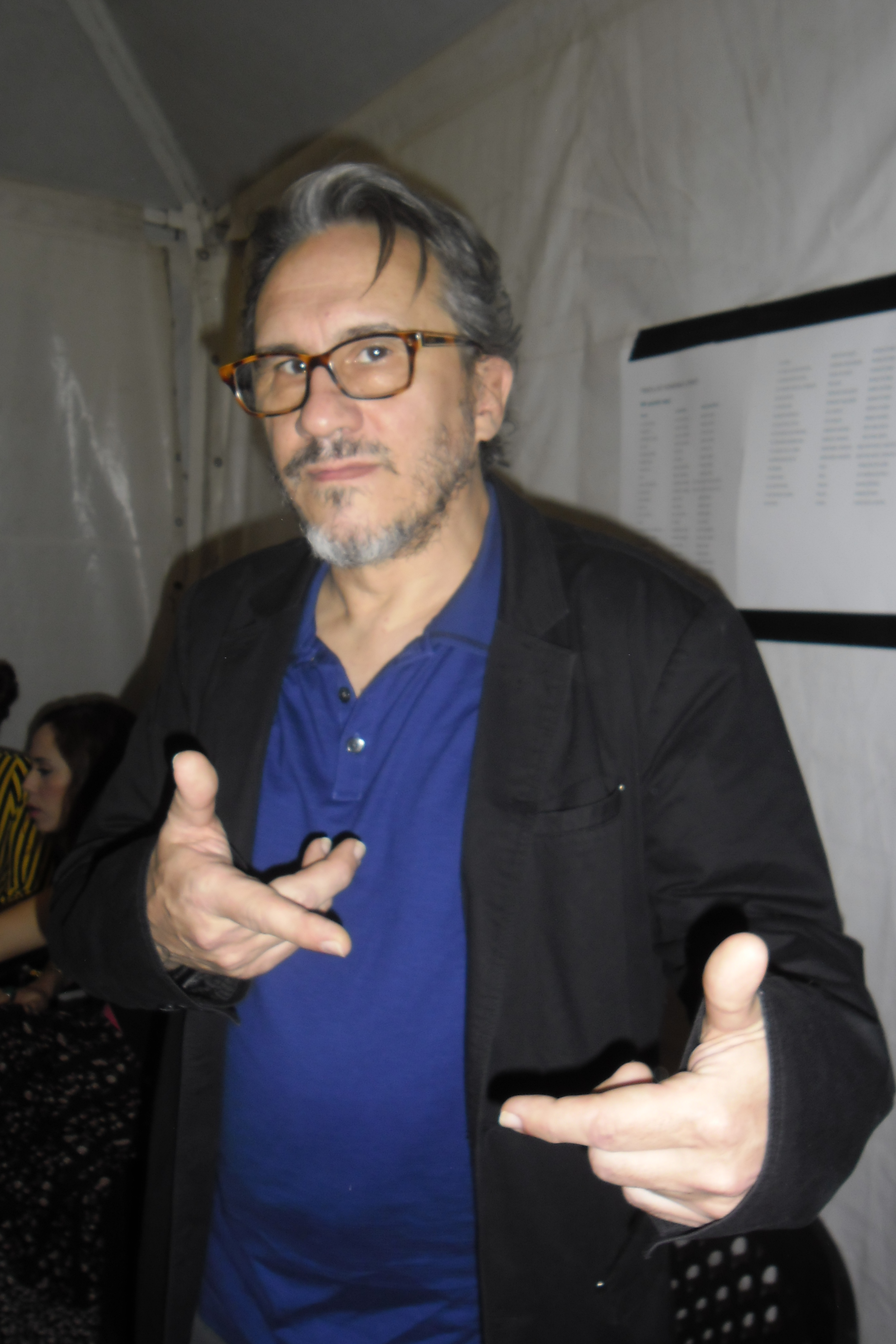 El músico y compositor Marciano Cantero en 2015.